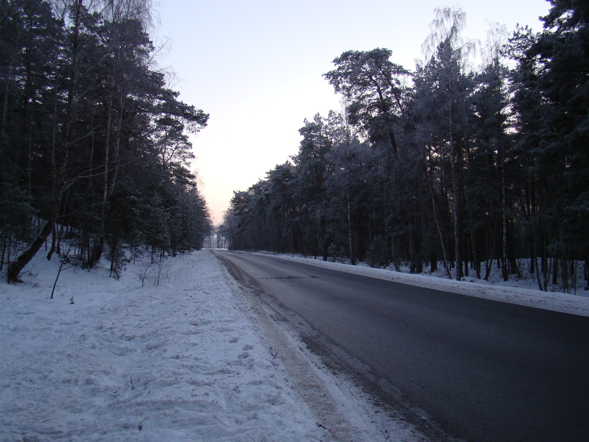 Klaipėda, Lithuania